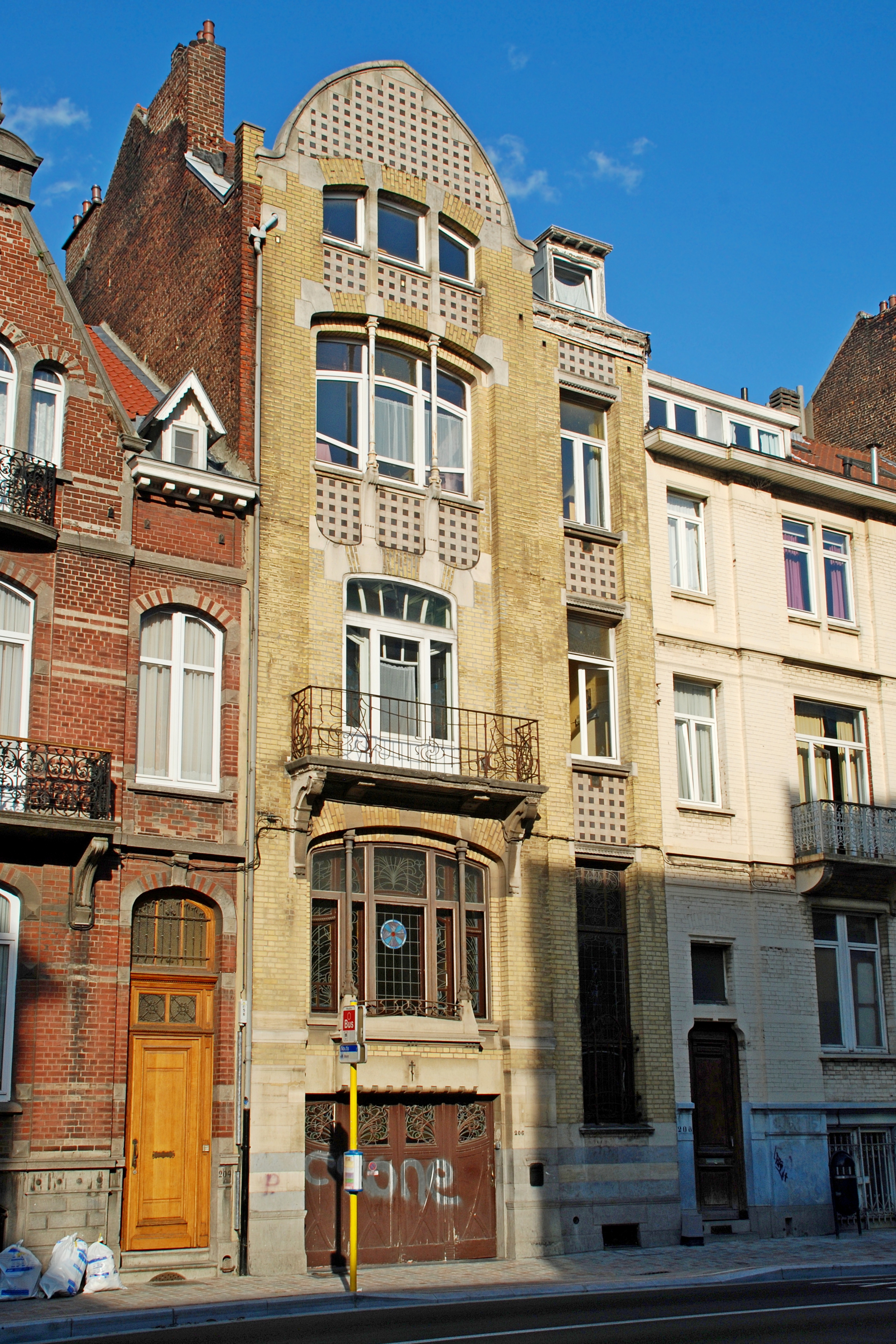 Belgique - Bruxelles - Maison Watteyne